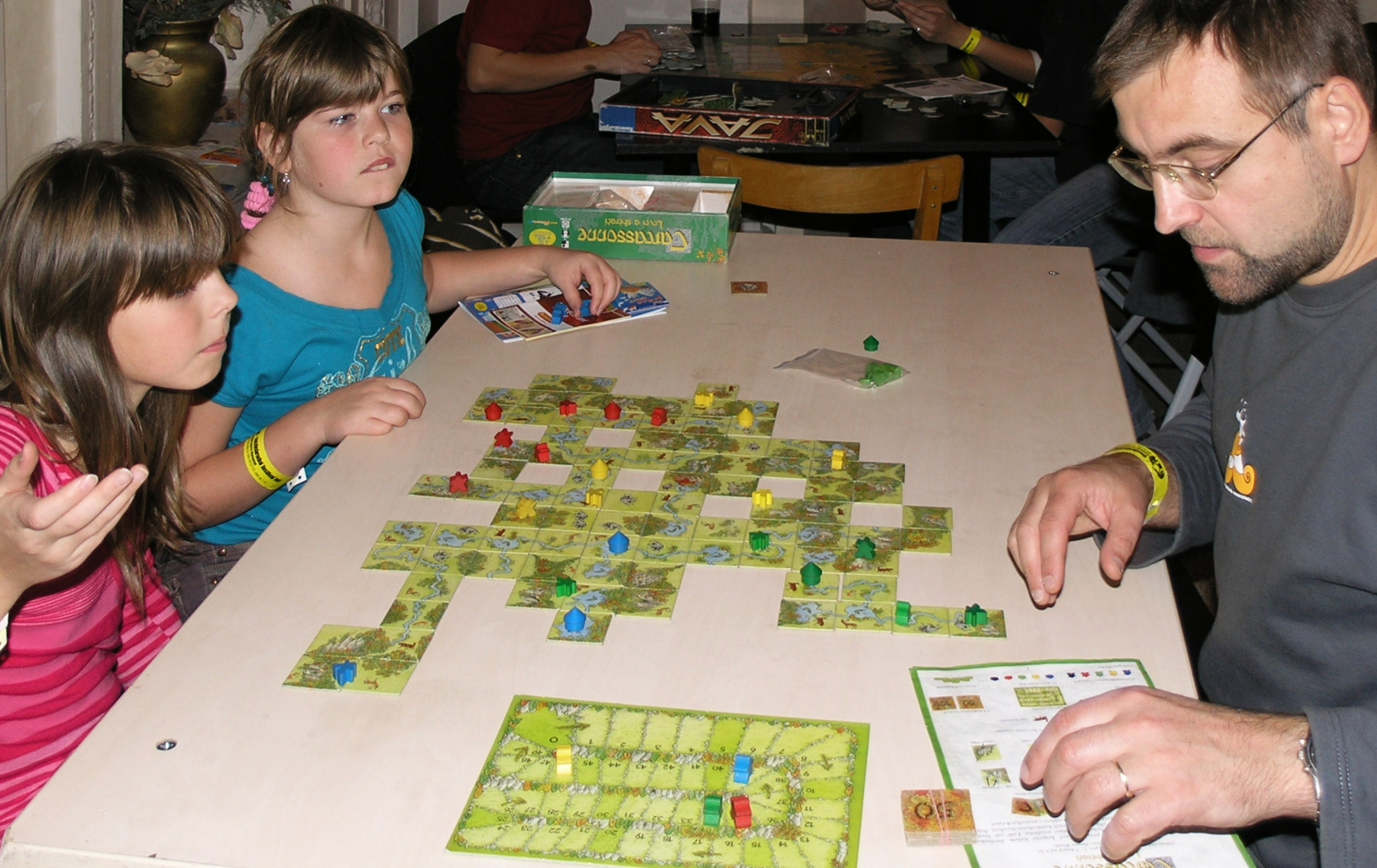 Deskohraní 2008